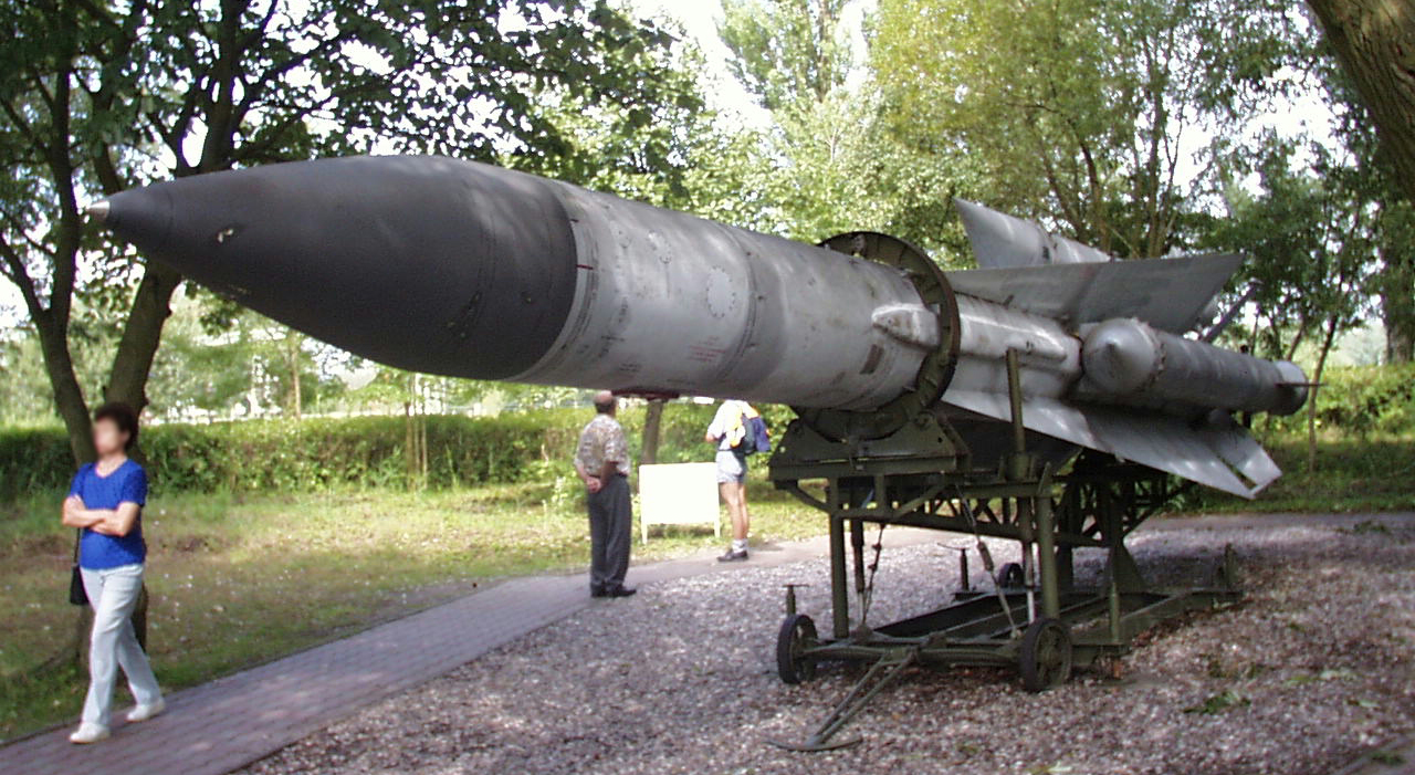 russische Boden-Luft-Rakete Wega S-200 WA - Nato Code: SA 5 Gammon